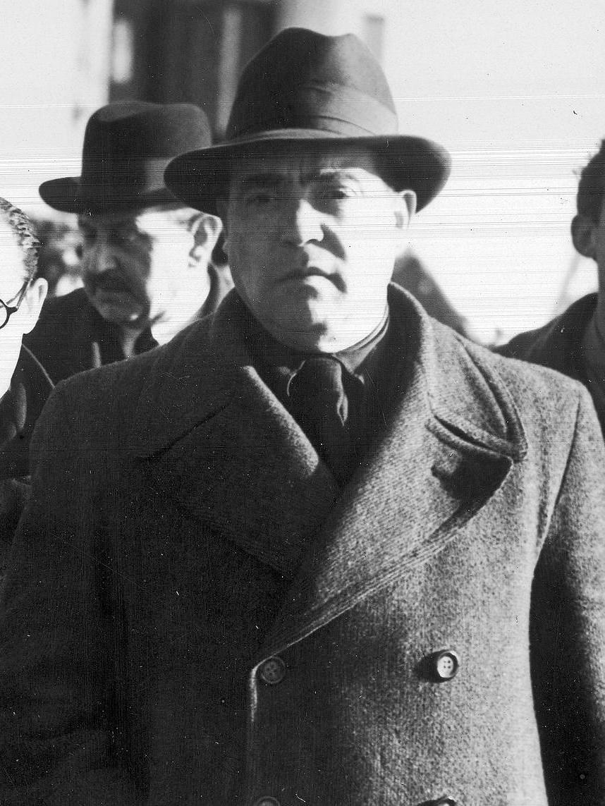 Członkowie Consejo Nacional de Defensa po przybyciu do Wielkiej Brytanii. Widoczni m.in. Segismundo Casado Lopez (w I rzędzie 1. z lewej) i Wenceslao Carrillo Alonso-Forjador (w I rzędzie w kapeluszu).